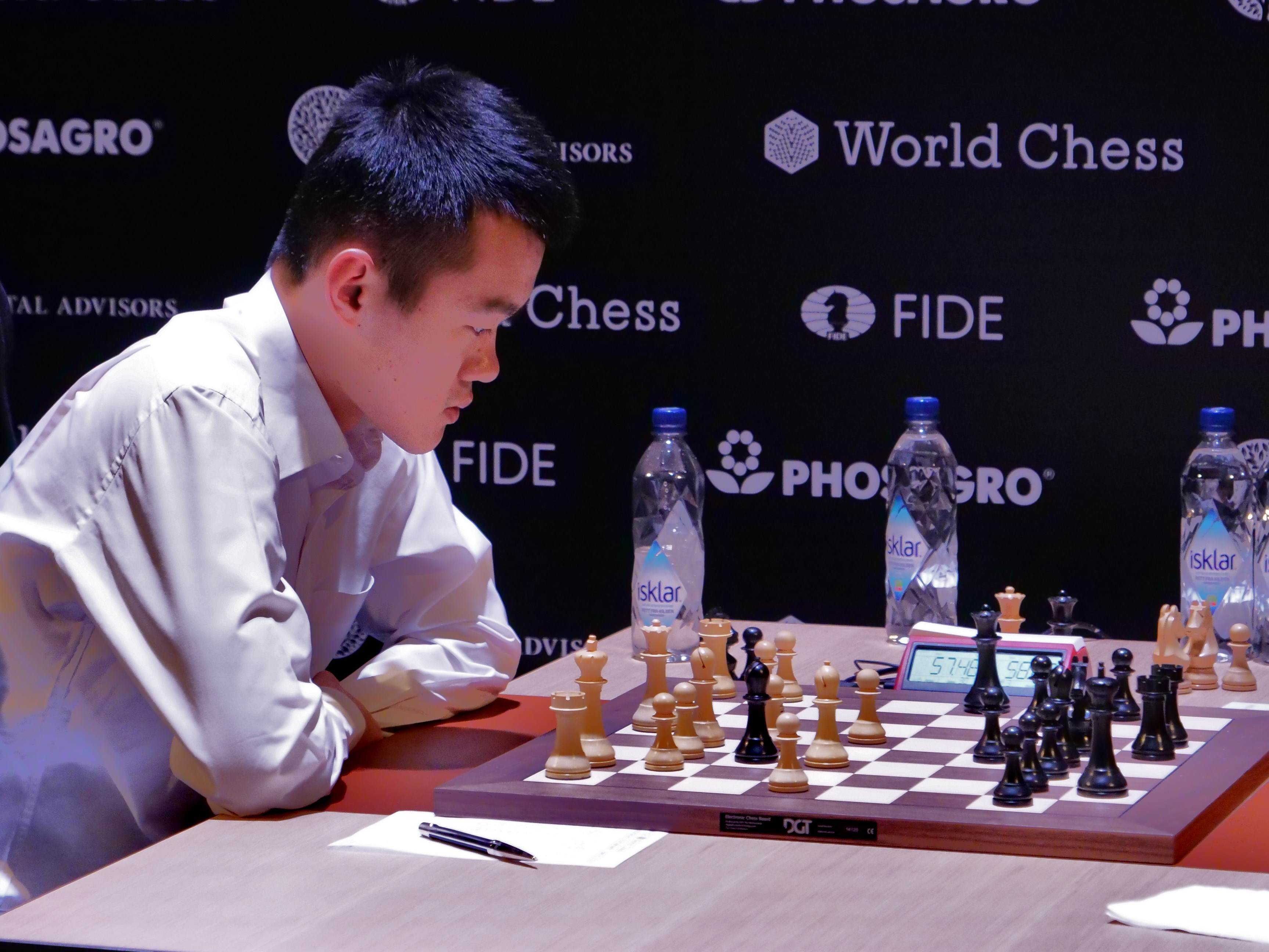 Ding beim Kandidatenturnier Berlin 2018 Runde 10